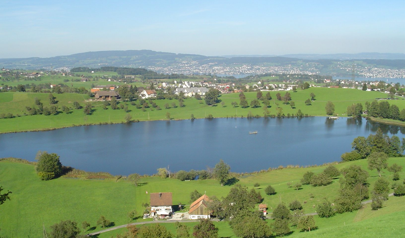 Hüttnersee